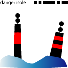 balisage de danger isolé en mer avec feu